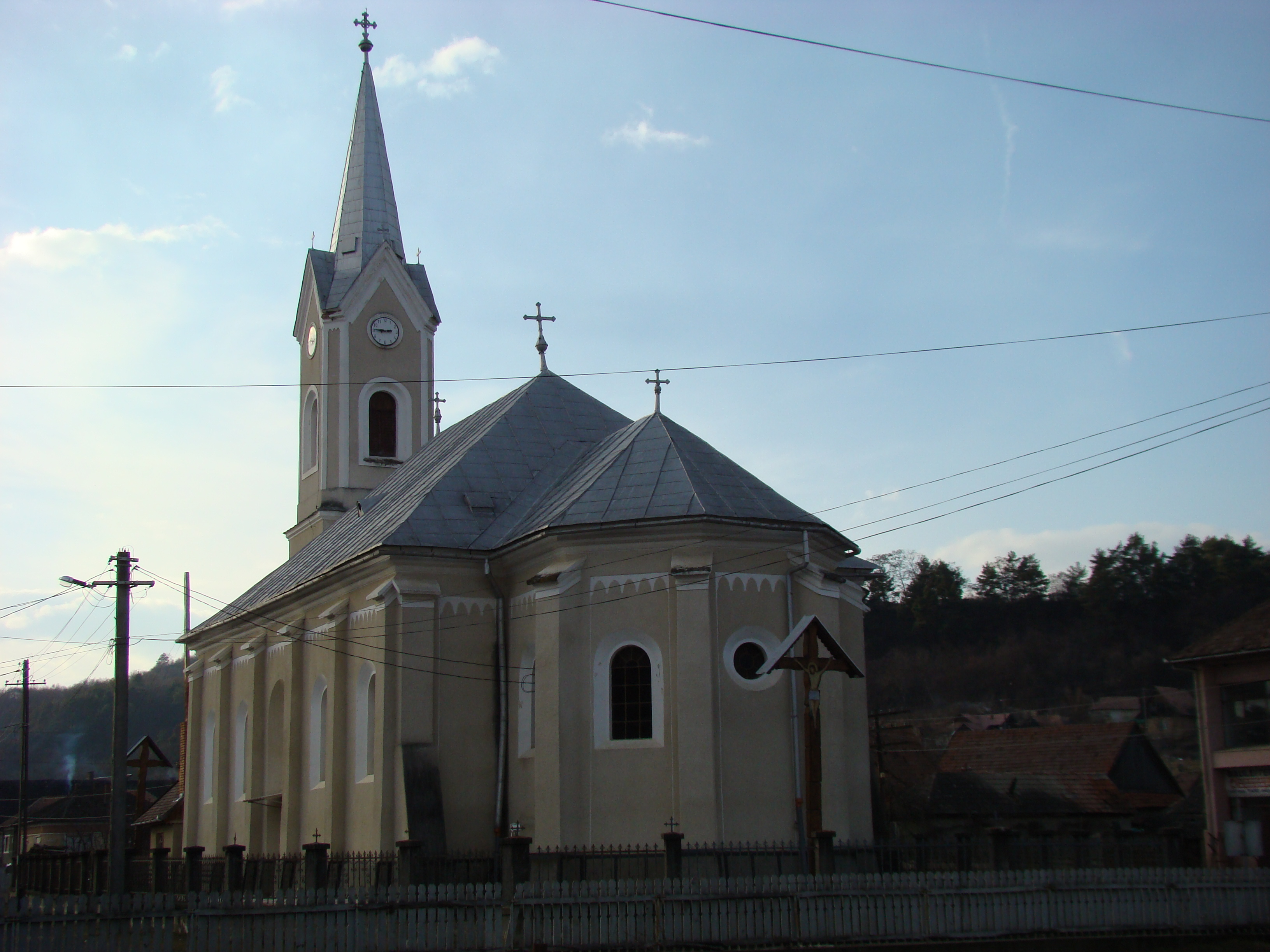 Imagine Almașu